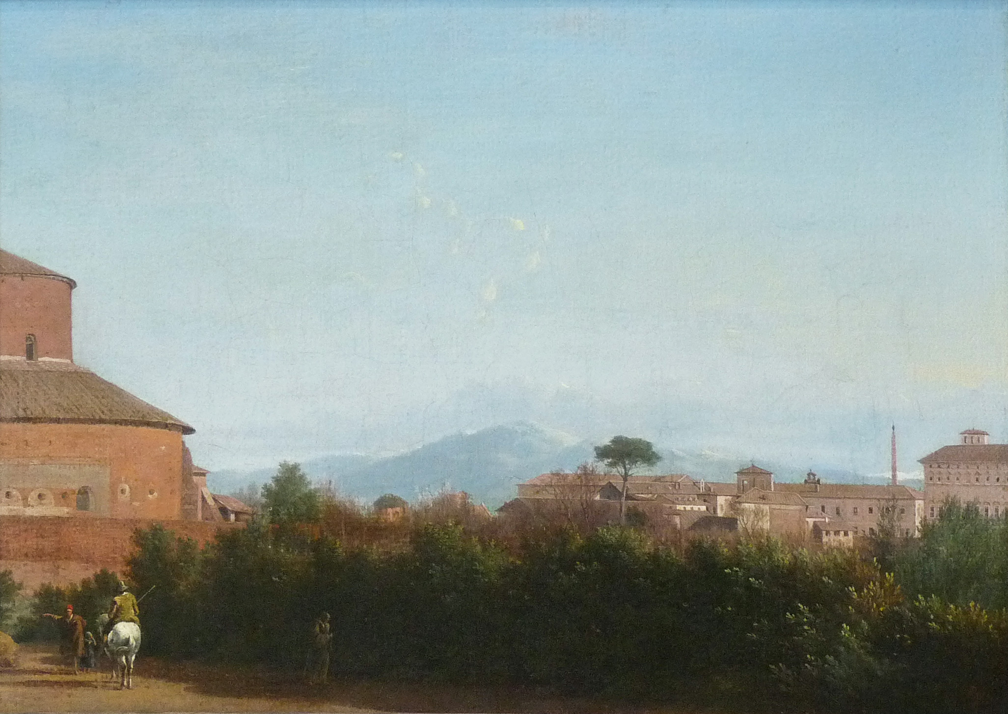 Paysager romain